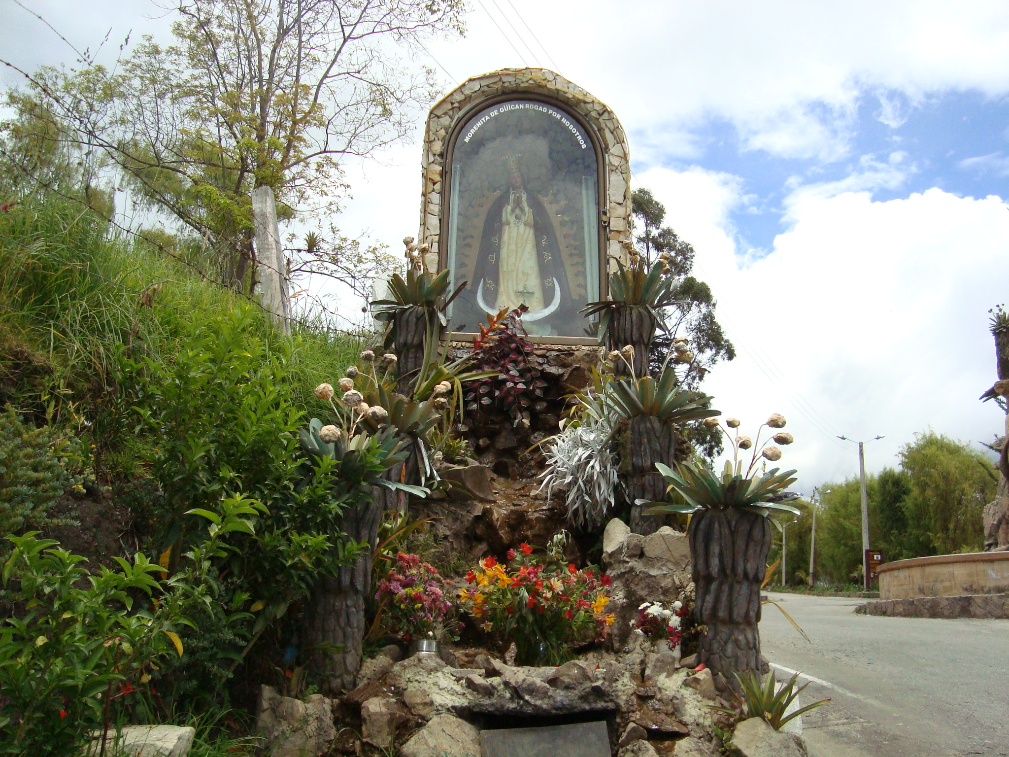 ENTRADA DEL PUEBLO DE GUICAN